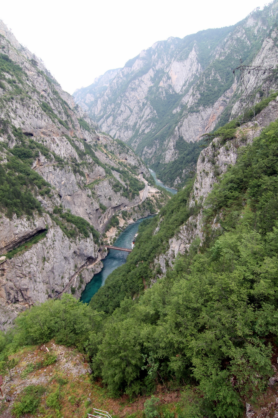 IMG_4743Montenegro_kanyon